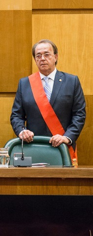 Carlos Pérez Anadón en octubre de 2015.